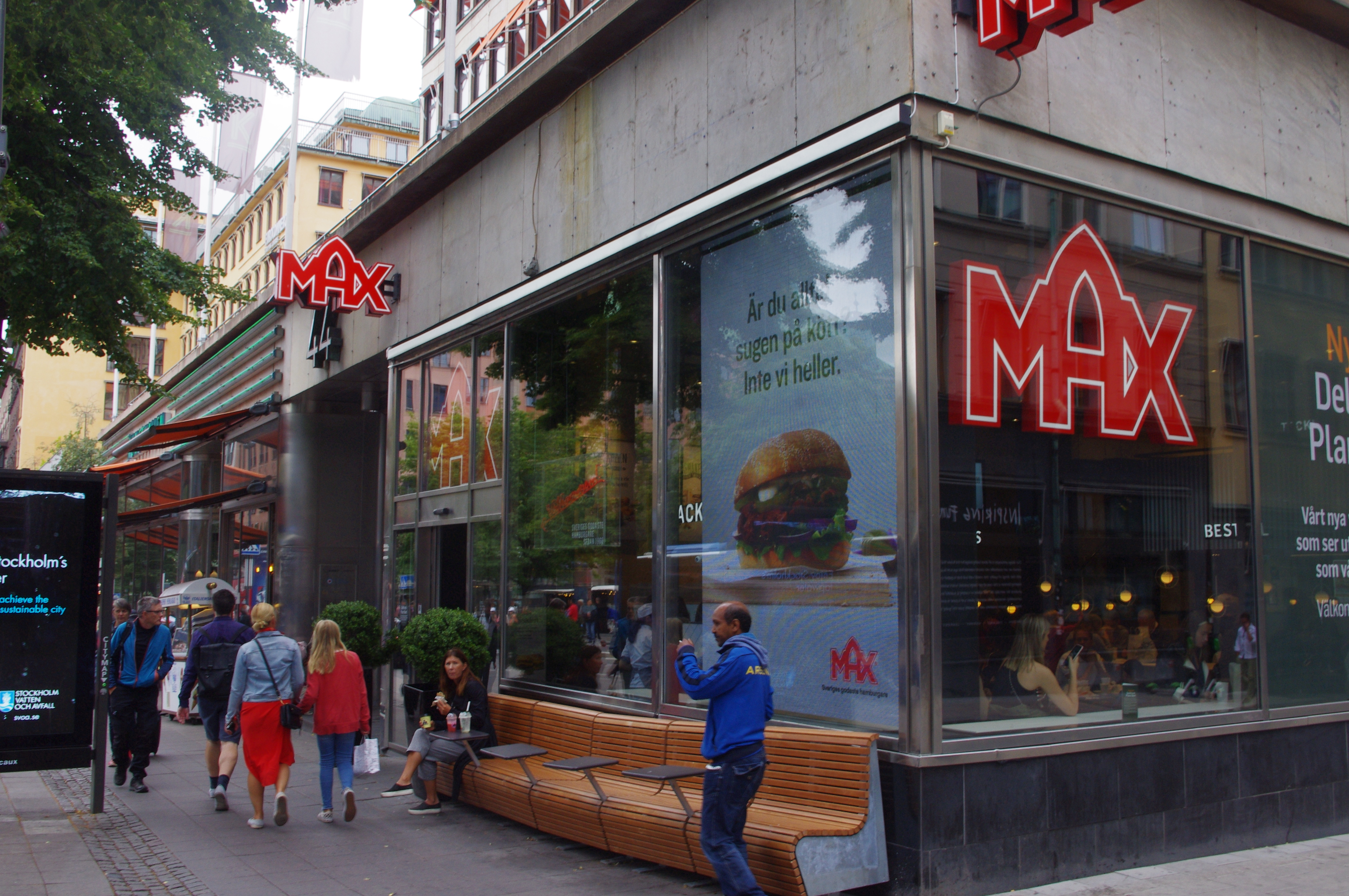 Max vid Hötorget